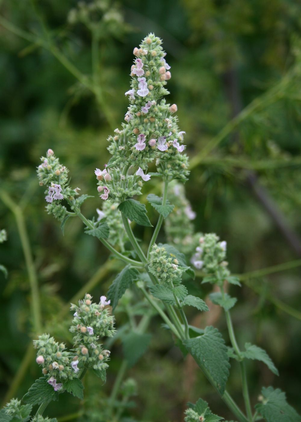 Gewöhnliche Katzenminze (Nepeta cataria), Lippenblütler (Lamiaceae) - Österreich/Austria/Autriche: Niederösterreich, Deutsch Haslau, ENE Bruck a.d. Leitha